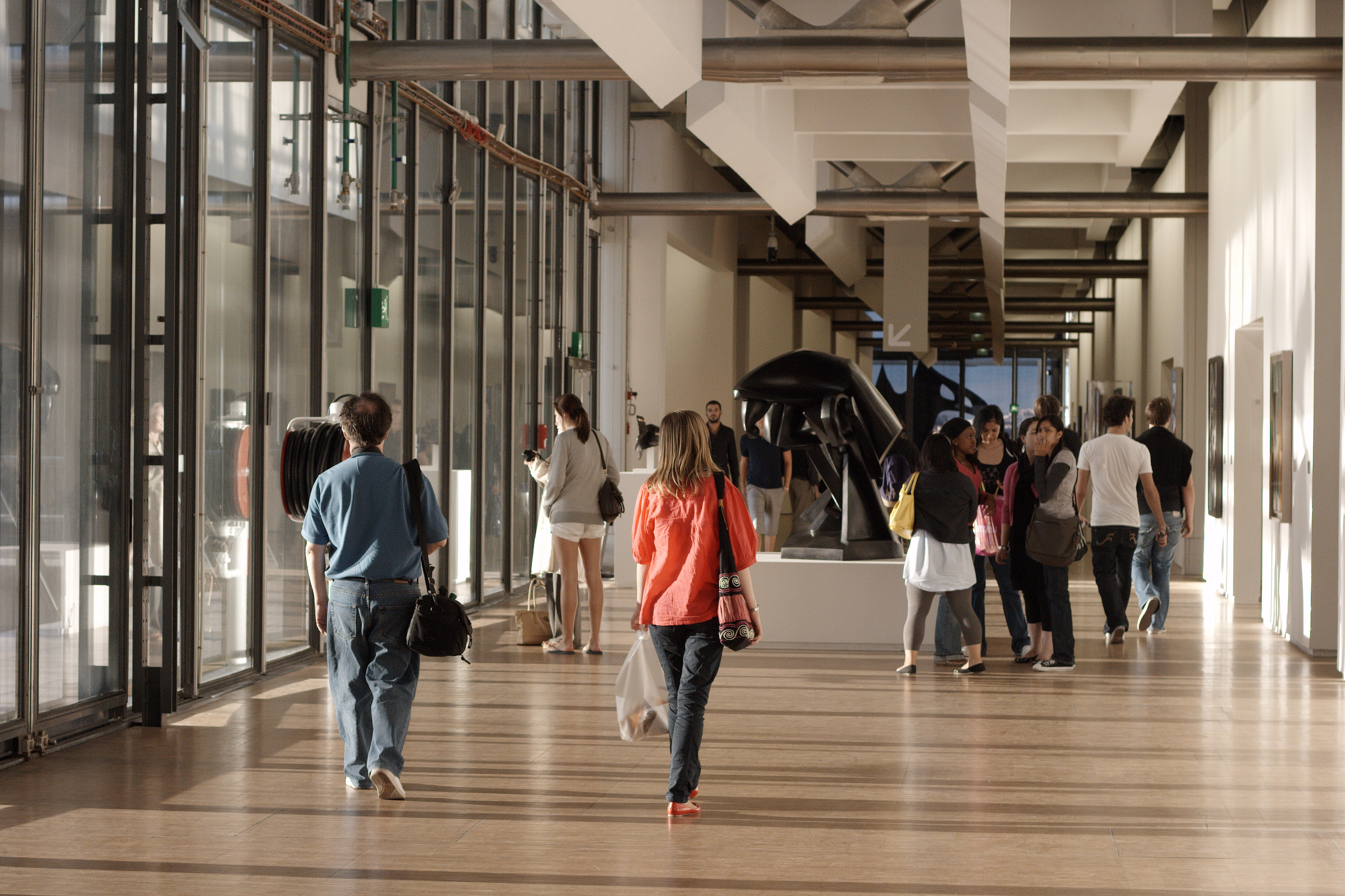 Centre Georges-Pompidou